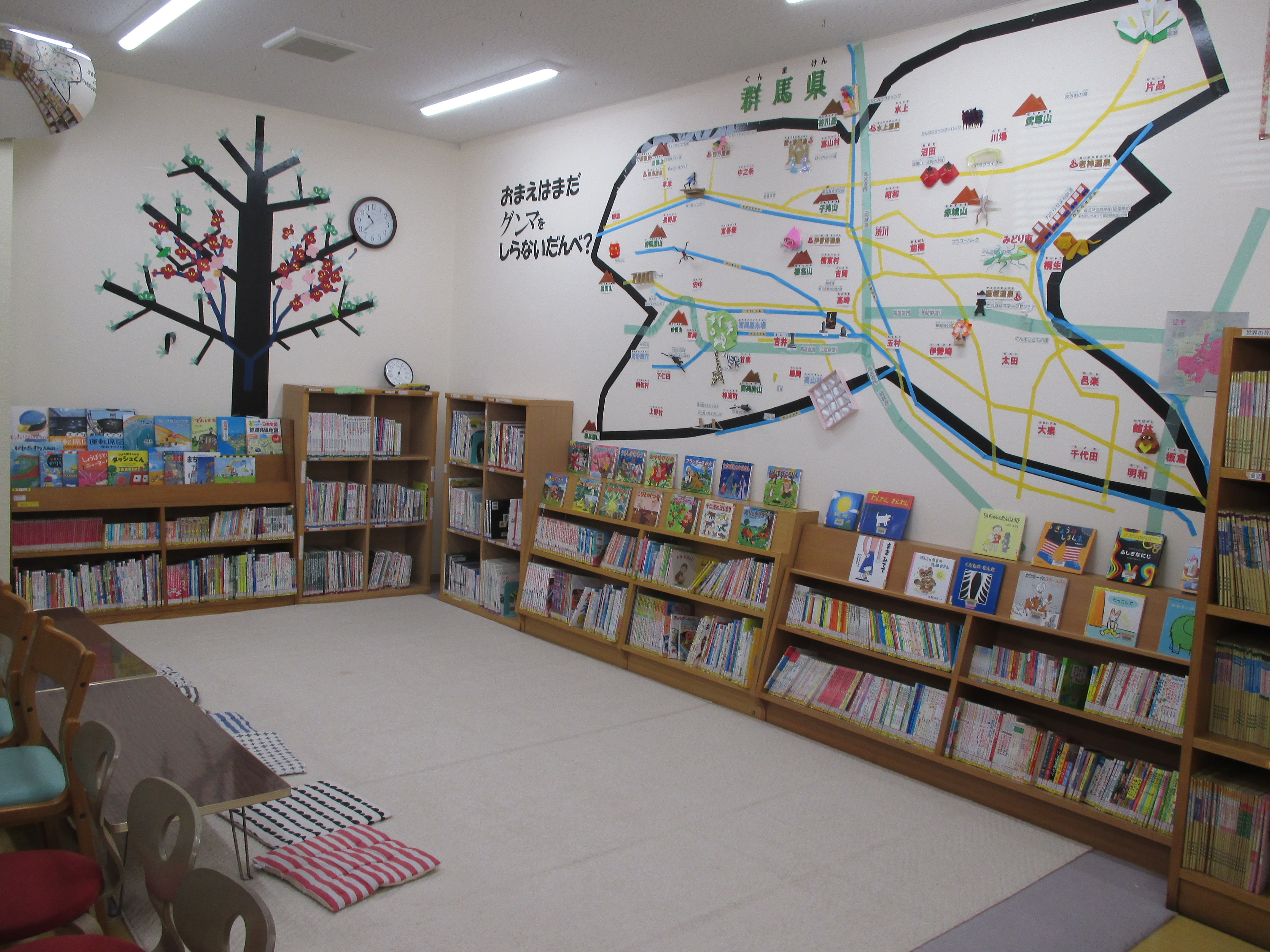 山種記念吉井図書館内部幼児コーナー